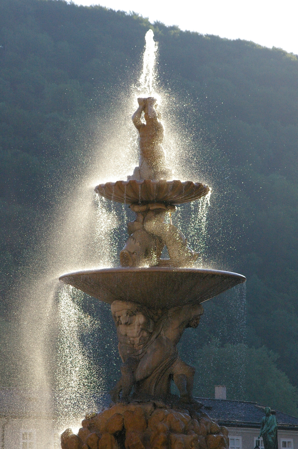 Der Residenzbrunnen in Salzburg früh am Morgen im Gegenlicht.